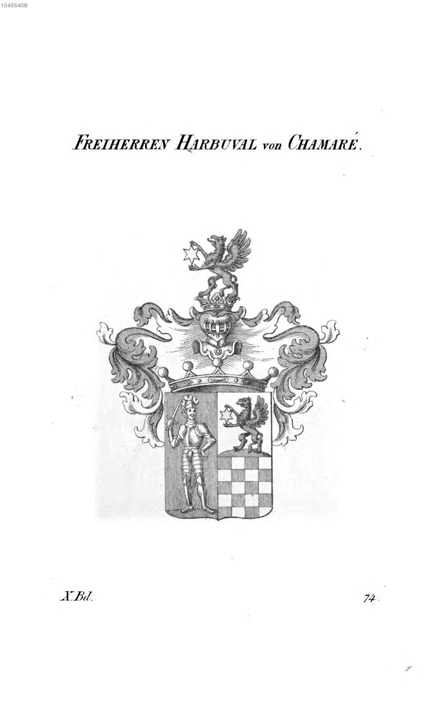 Wappen Harbuval von Charamé - Tyroff AT.jpg